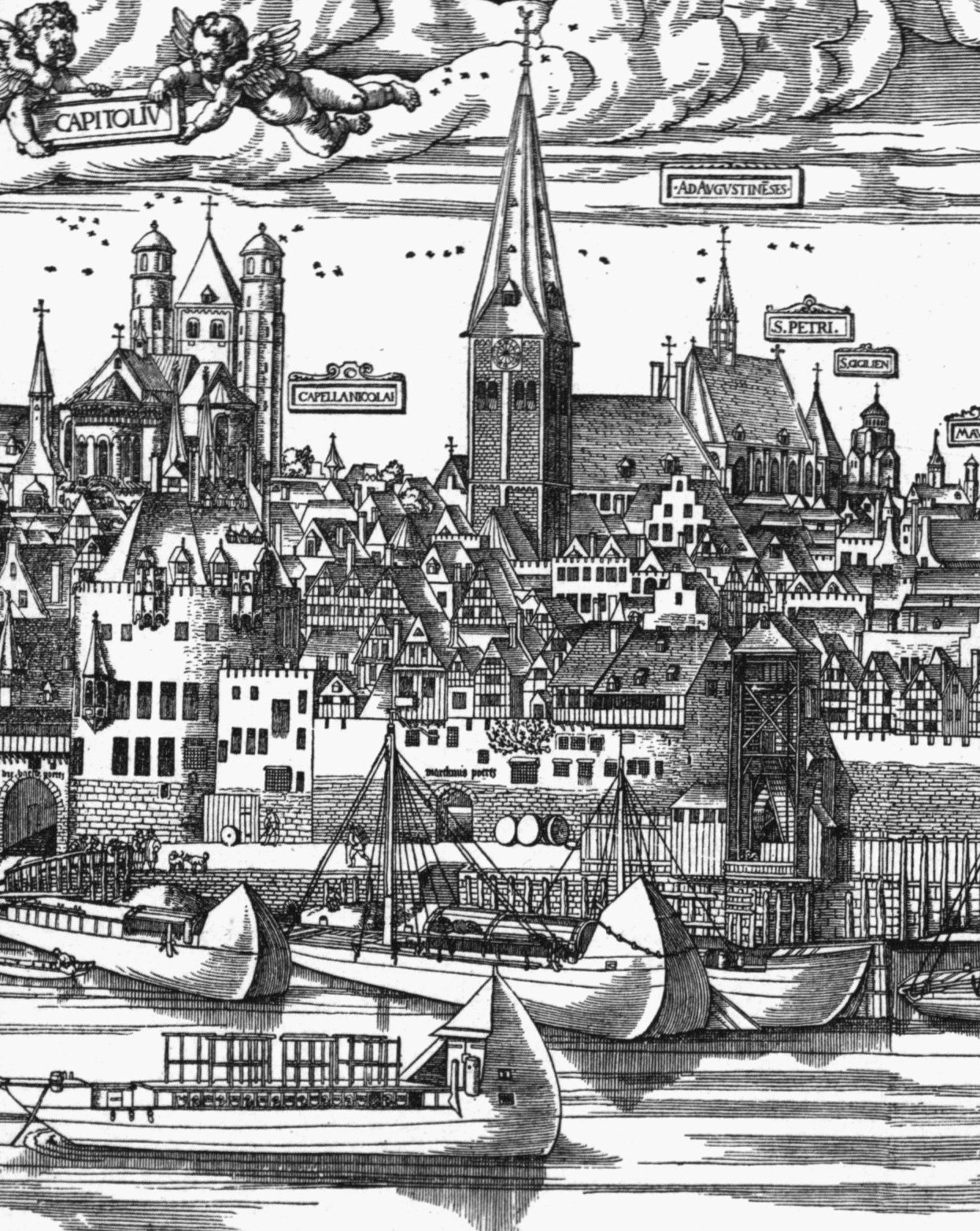 Holzschnitt: Woensam Oberländer Schiffe (1531)